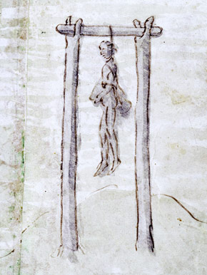 Gibet - Fourches patibulaires - Aquarelle du XVIII° siècle artiste inconnu